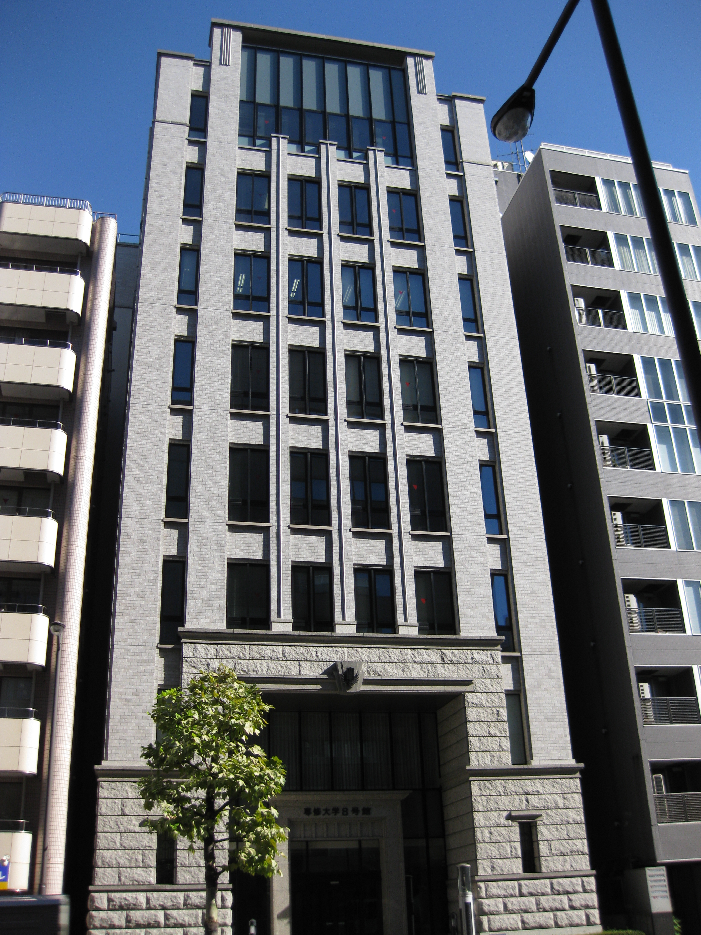 専修大学法科大学院